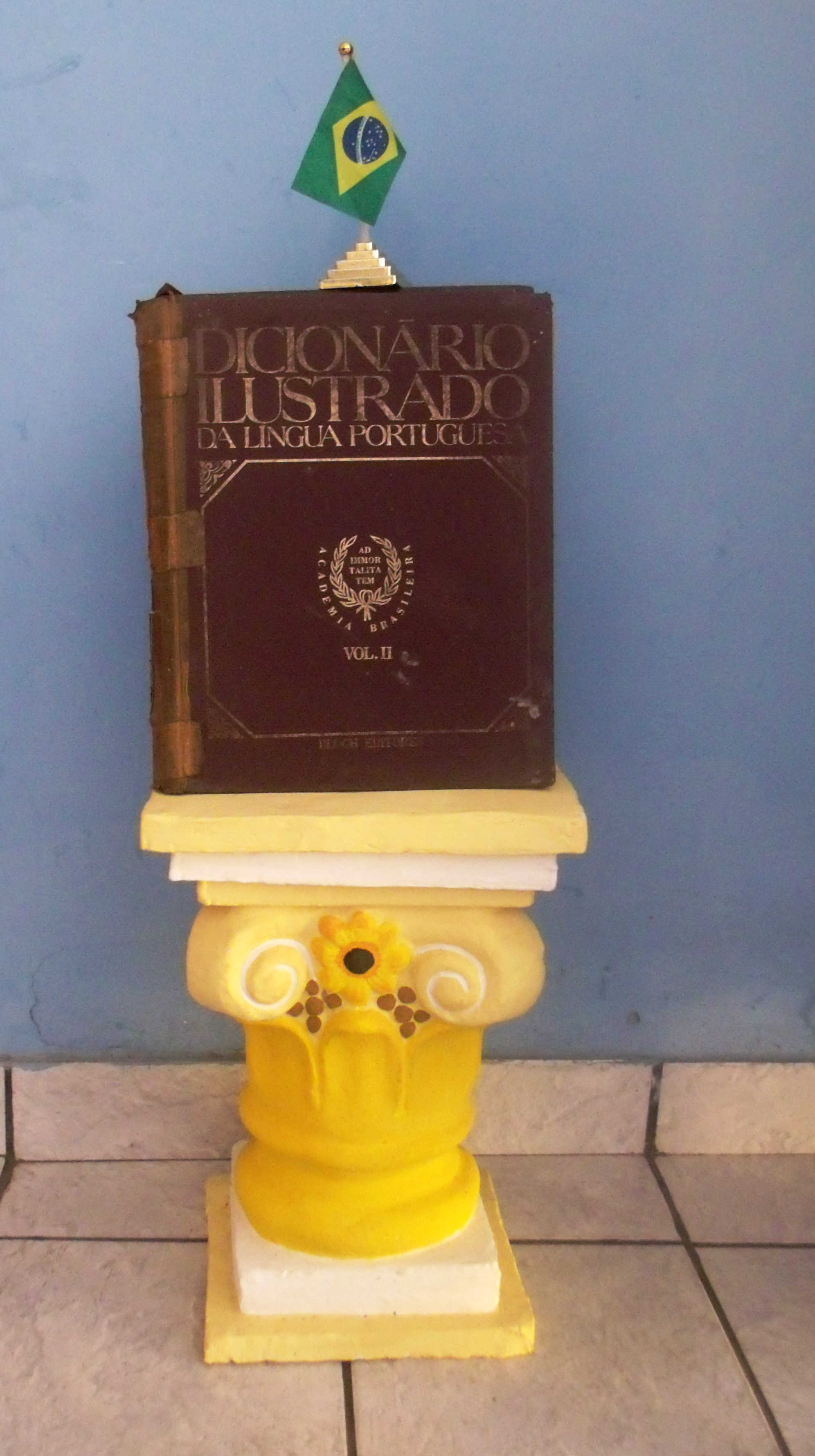 Coluna decorada com o Dicionário Ilustrado da Língua Portuguesa da Academia Brasileira de Letras.